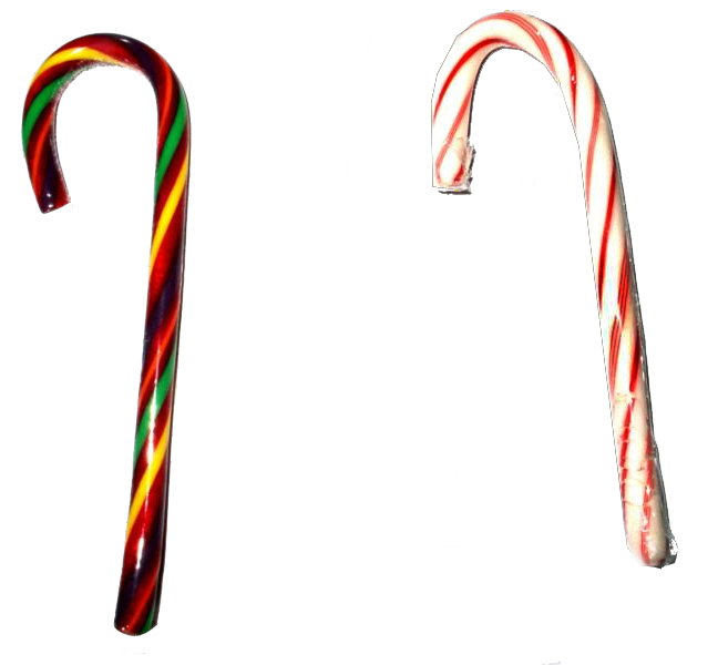 מקל סבא